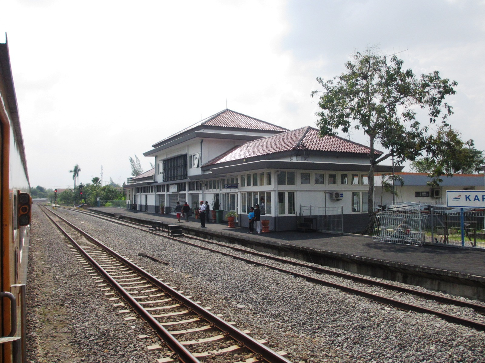 Bangunan baru Stasiun Kapas, Bojonegoro.